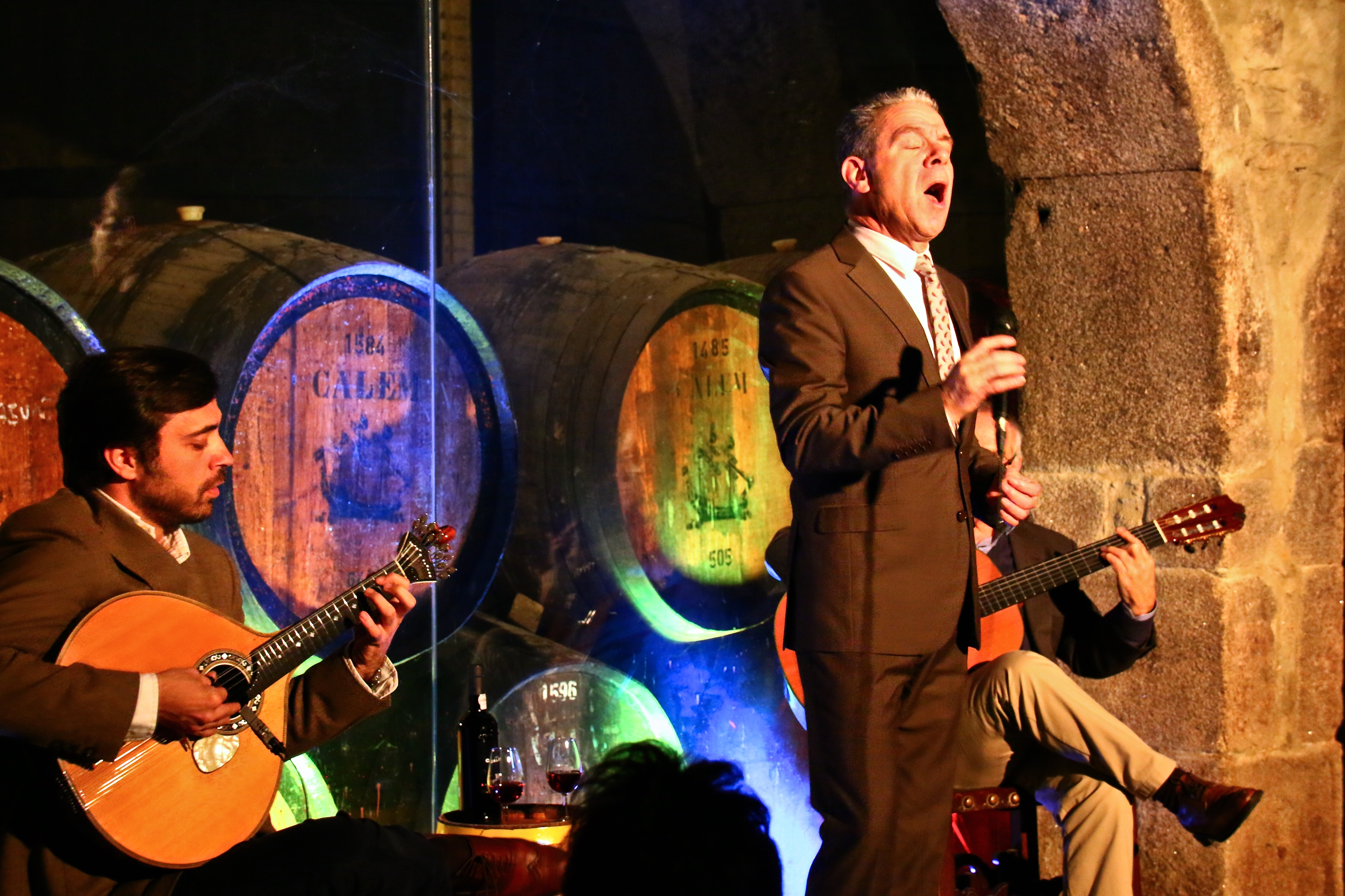 Visite de la cave de vin de Porto Calem et spectacle fado combiné. Barges servant à transport les futs de porto sur le Douro